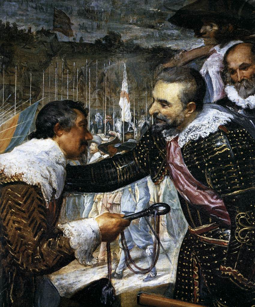 La obra representa el momento en que Justino de Nassau rindió la ciudad de Breda, en 1625, a las tropas españolas al mando del general Ambrosio Spínola, que aparece recibiendo las llaves de la ciudad de manos de su enemigo.